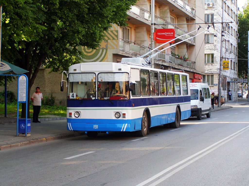 ЗиУ